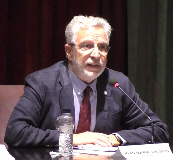 El dijous 26 d’octubre de 2017 s’ha realitzat al Centre de Lectura de Reus la lliçó inaugural del curs acadèmic 2017-2018 amb la conferència: «La Segona Guerra Mundial revisitada: feixisme, lluita per l’hegemonia i recursos naturals», a càrrec del Dr. Joan Maria Thomàs Andreu, investigador ICREA Acadèmia i professor d’Història Contemporània de la Universitat Rovira i Virgili. Presentació a càrrec de Jaume Massó, president del Centre de Lectura.